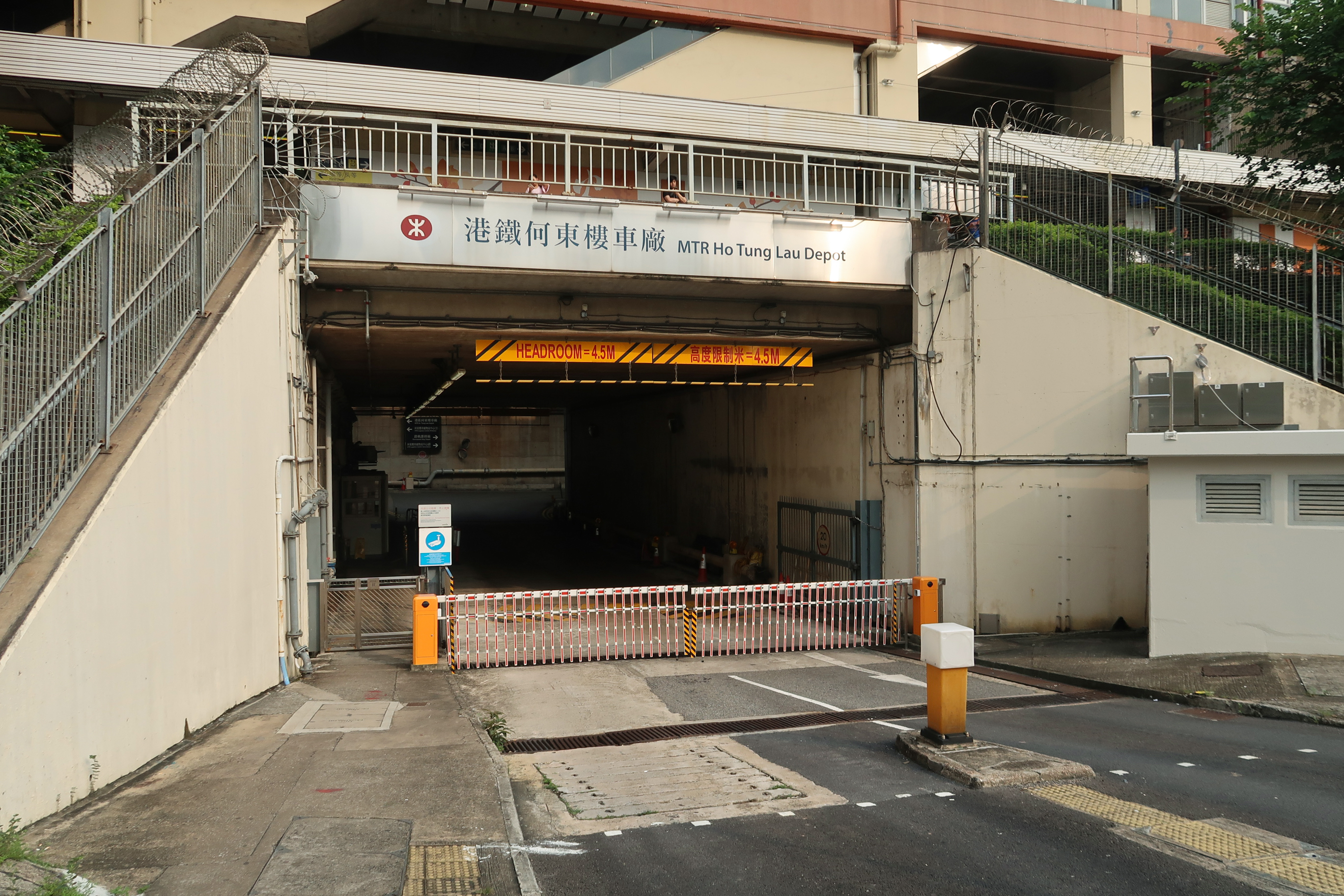 Ho Tung Lau Depot entrance